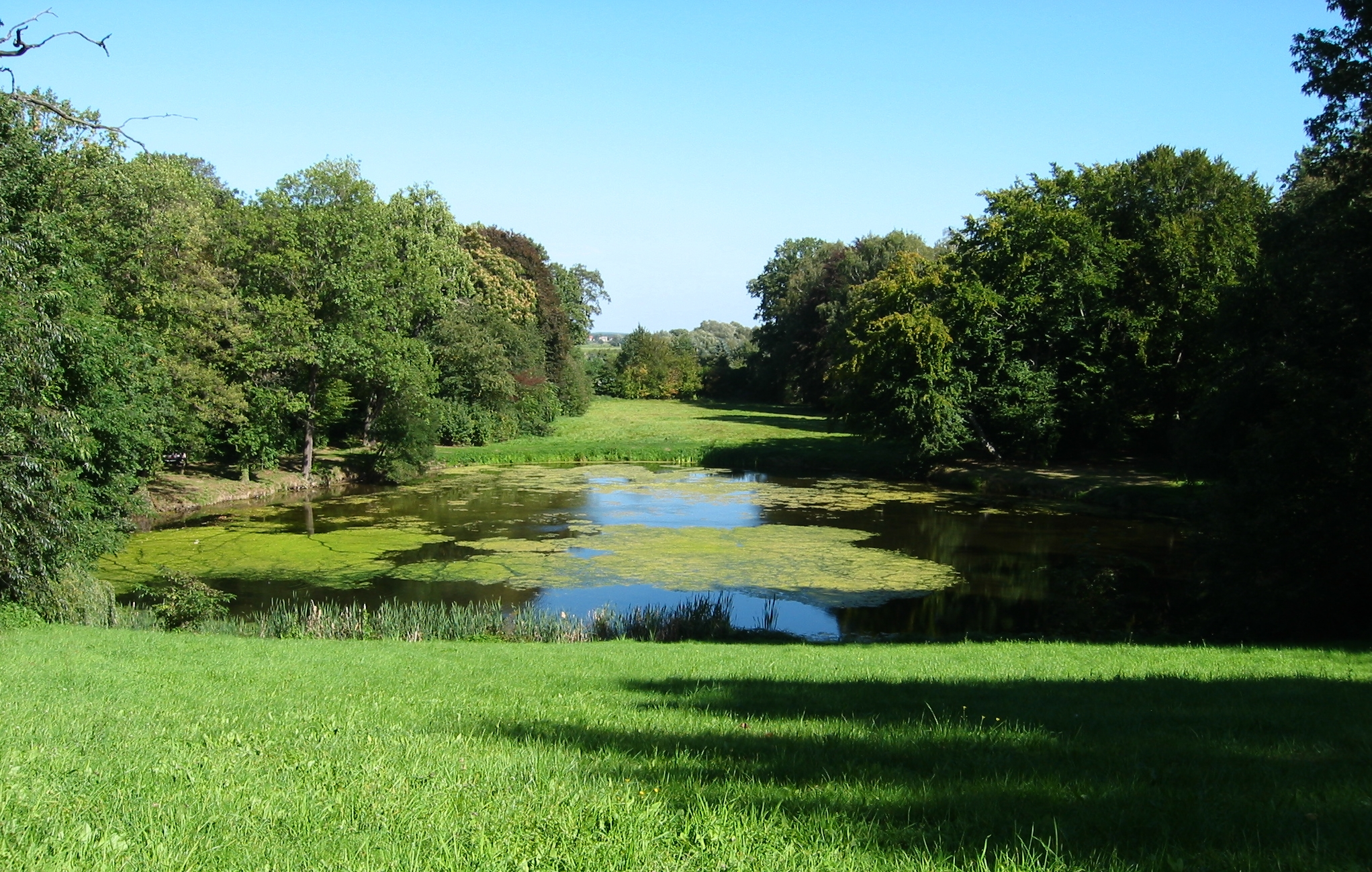 Schloss Hohenprißnitz, Park, als englischer Park angelegt, mit künstlich angelegtem Teich, ursprünglich mit Sichtachse zur nahen Mulde